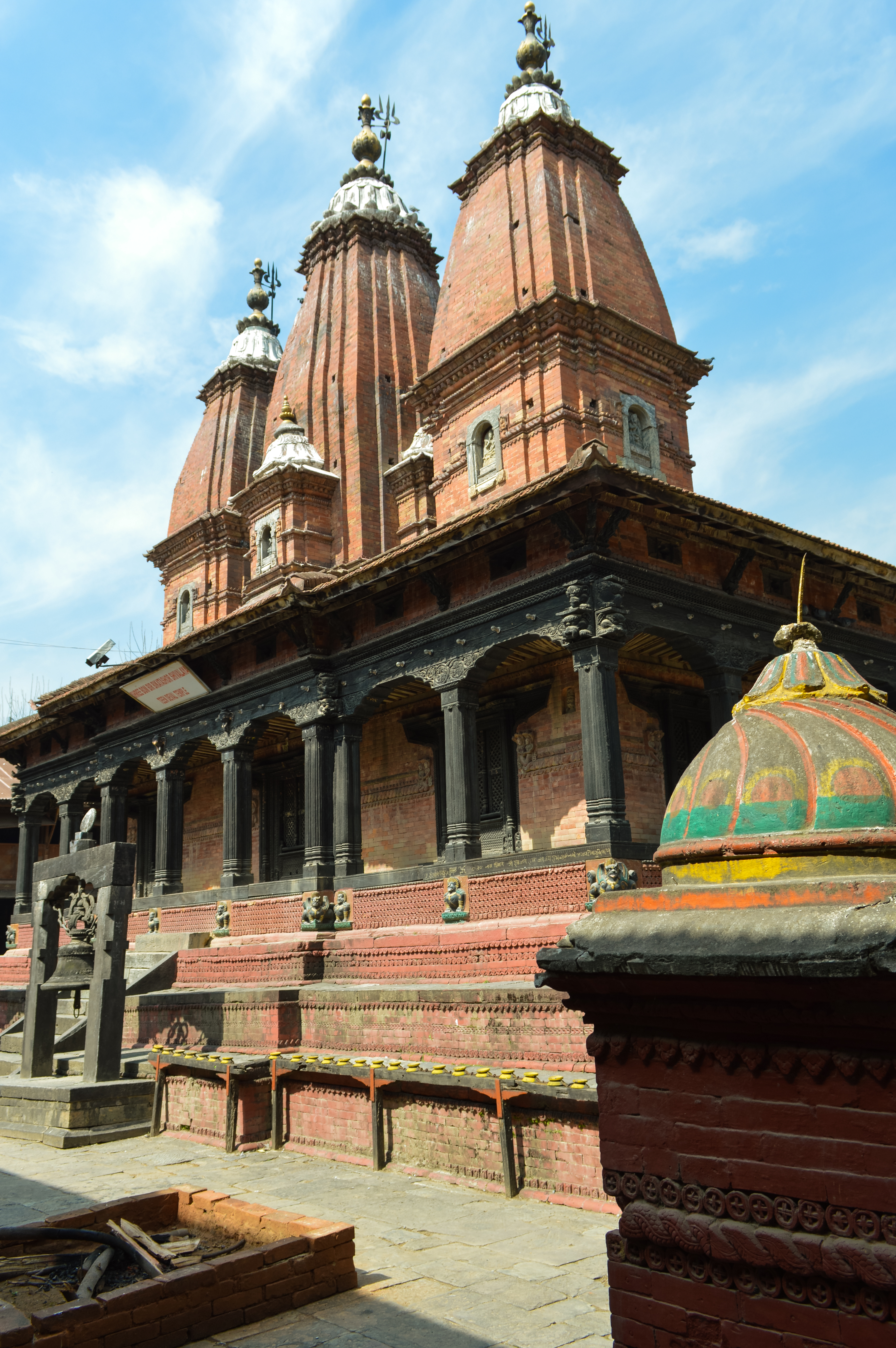 Teen Deval temple